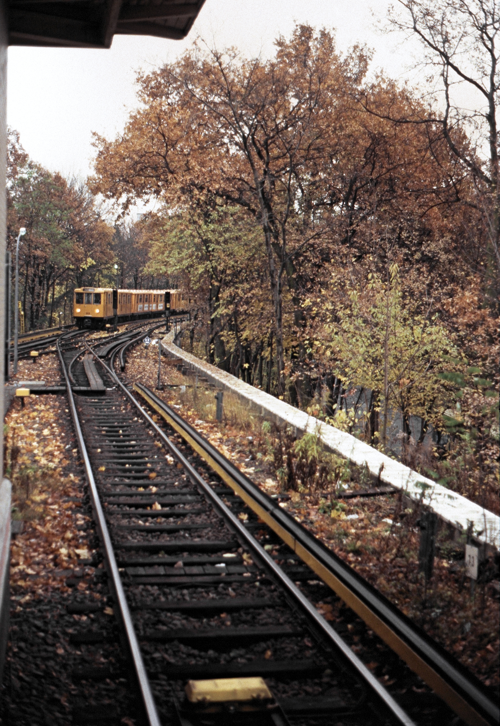 AIII-Zug bei Einfahrt in den Bahnhof Ruhleben